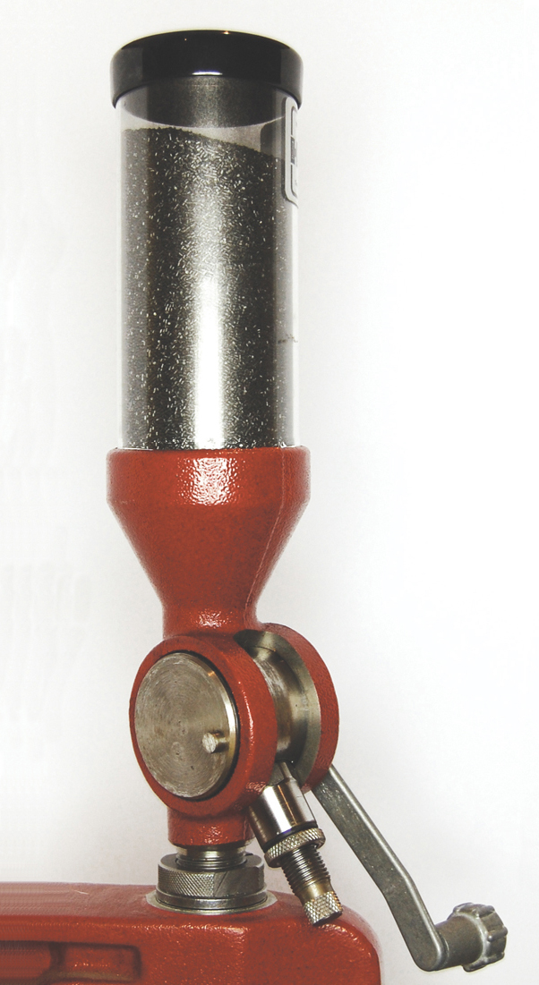 Zsyp do prochu